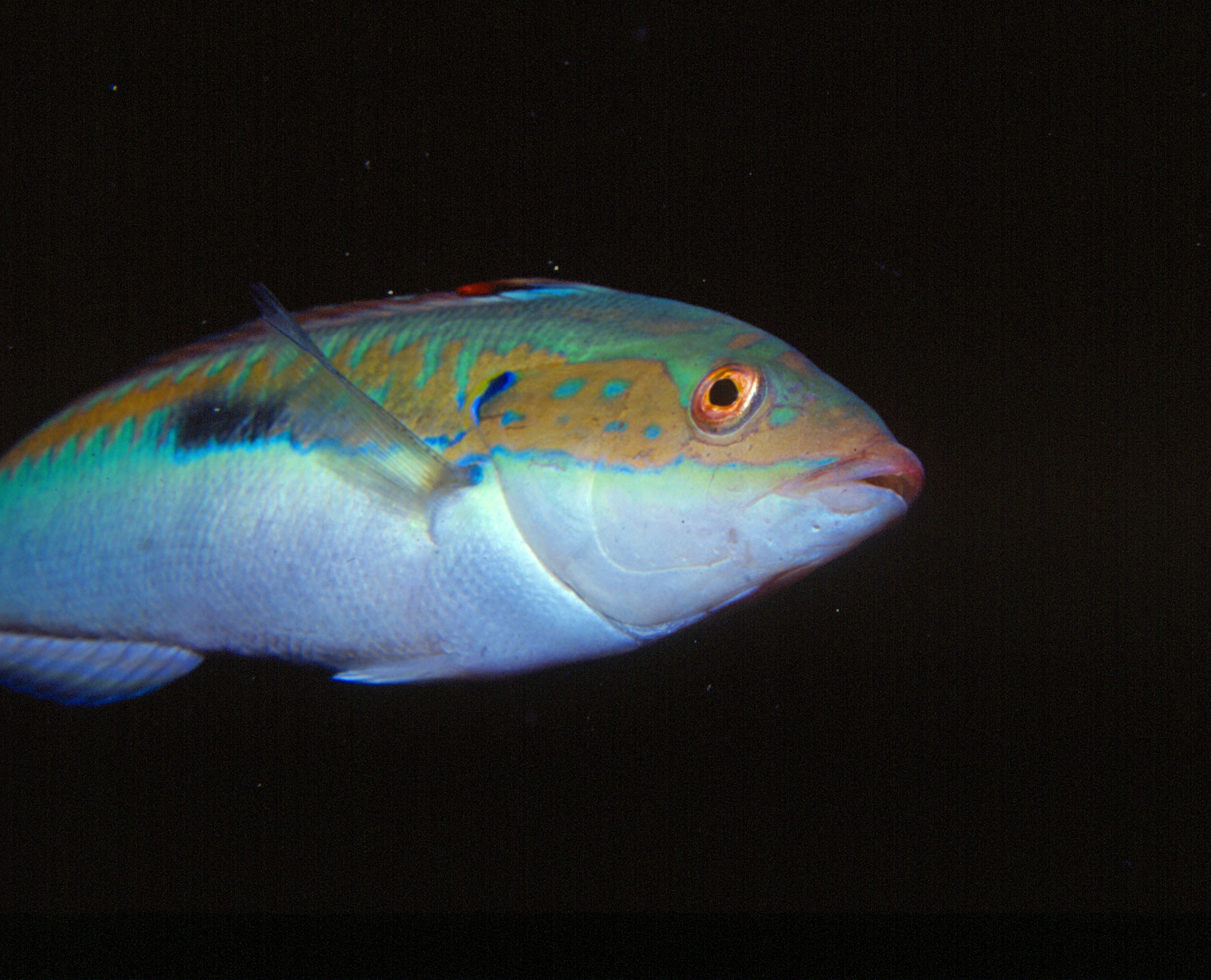 Coris julis (Linnaeus, 1758) - Banyuls-sur-Mer : 08/89, mâle. Comme chez le mérou, Coris julis naît femelle et meurt mâle - protogynie ou protérogynie, les organes sexuels femelles étant mâtures plus tôt que les organes sexuels mâles.